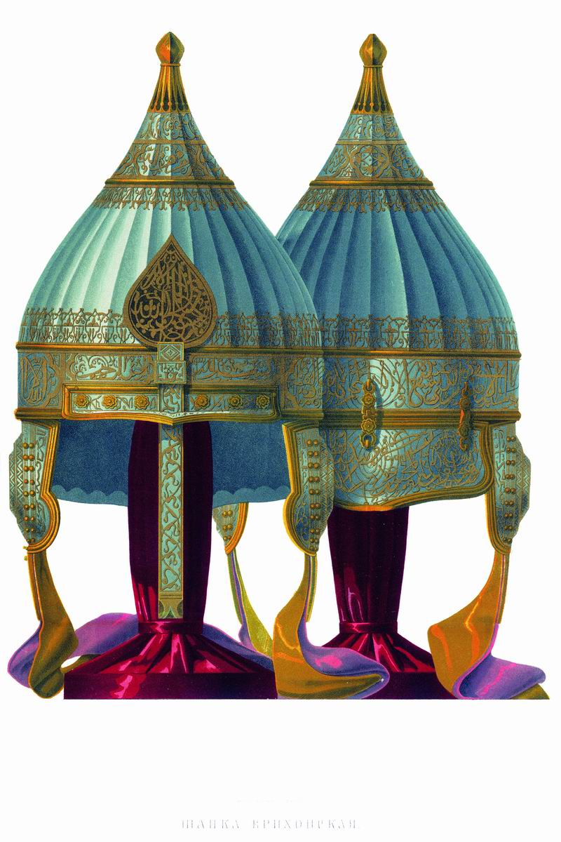 Ерихонка князя Алексея Михайловича Львова (красный булат). Шапка ерихонская Булатный шлем, хранящийся в Оружейной палате под № 5, по описи 1687 г., составленной по «прежним переписным книгам», означен «Князя Алексея Михайловича Львова», окольничего при царе Михаиле Федоровиче. Подвершье, венец, щиток, нос, бармица и наушки насечены золотом в узор с арабскими речениями из Корана, сходными с изображенными на шлеме благоверного великого князя Александра Невского. В описи 1687 г., листы 462—463, он означен четвертым и описан следующим образом: «Шапка Ерихонская з долами, булат красной, венец и в венце в наводе слова Арабские, по верху венца кайма и под верхним венцом кайма ж и над каймою подвершье наведено золотом, да наверху яблоко золочено гладью; дорога на затылке и на ушках и на полке круглая гладкая золотая; на ушках сто шестьдесят гвоздей горощетых да десять репейчатых серебреных золоченых; на венце и на полке в закрепке десять гвоздей репейчатых; уши и затылок и полка наведены золотом, промеж наводу слова Арабские; у затылка три чепи серебреные с пробойцы золочены; нос прорезной наведен золотом травы; подложено отласом червчатым да по две завязки отлас желт да червчат. В прежних переписных книгах под тою статьею написано, по сказке мастеров: та шапка Князя Алексеевская Михайловича Львова. А по нынешней переписи рч`є года (1687) и по осмотру, та шапка против прежних переписных книг сошлась; цена той шапке триста рублей; а в прежней описной книге написана третья».